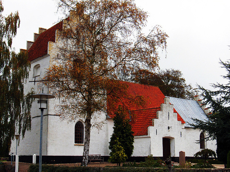 fra sydvest